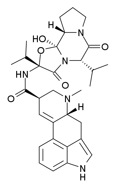 ergocornine